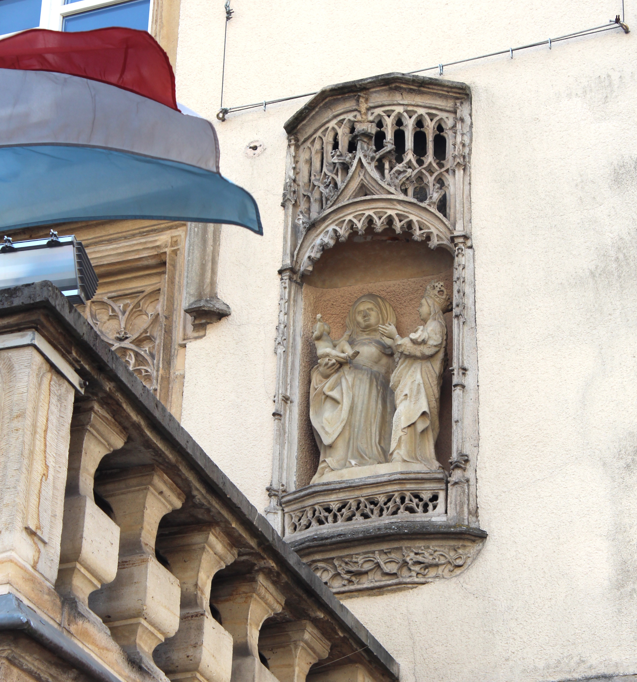 D'Skulptur vun der Anna Selbdritt an der Fassad vum Haus Ënner de Stäiler um Fëschmaart an der Stad Lëtzebuerg